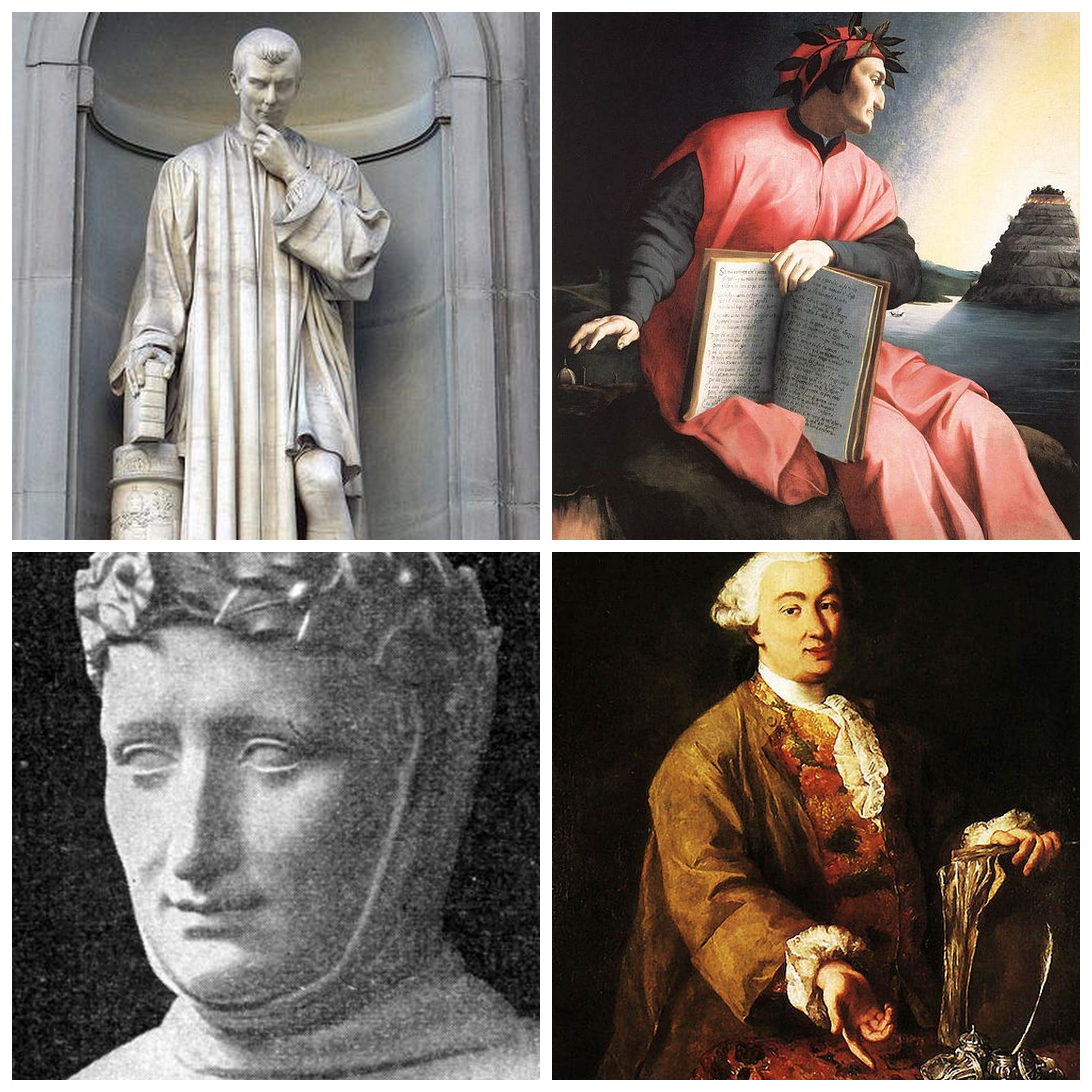 Collage di quattro foto su pittori italiani.